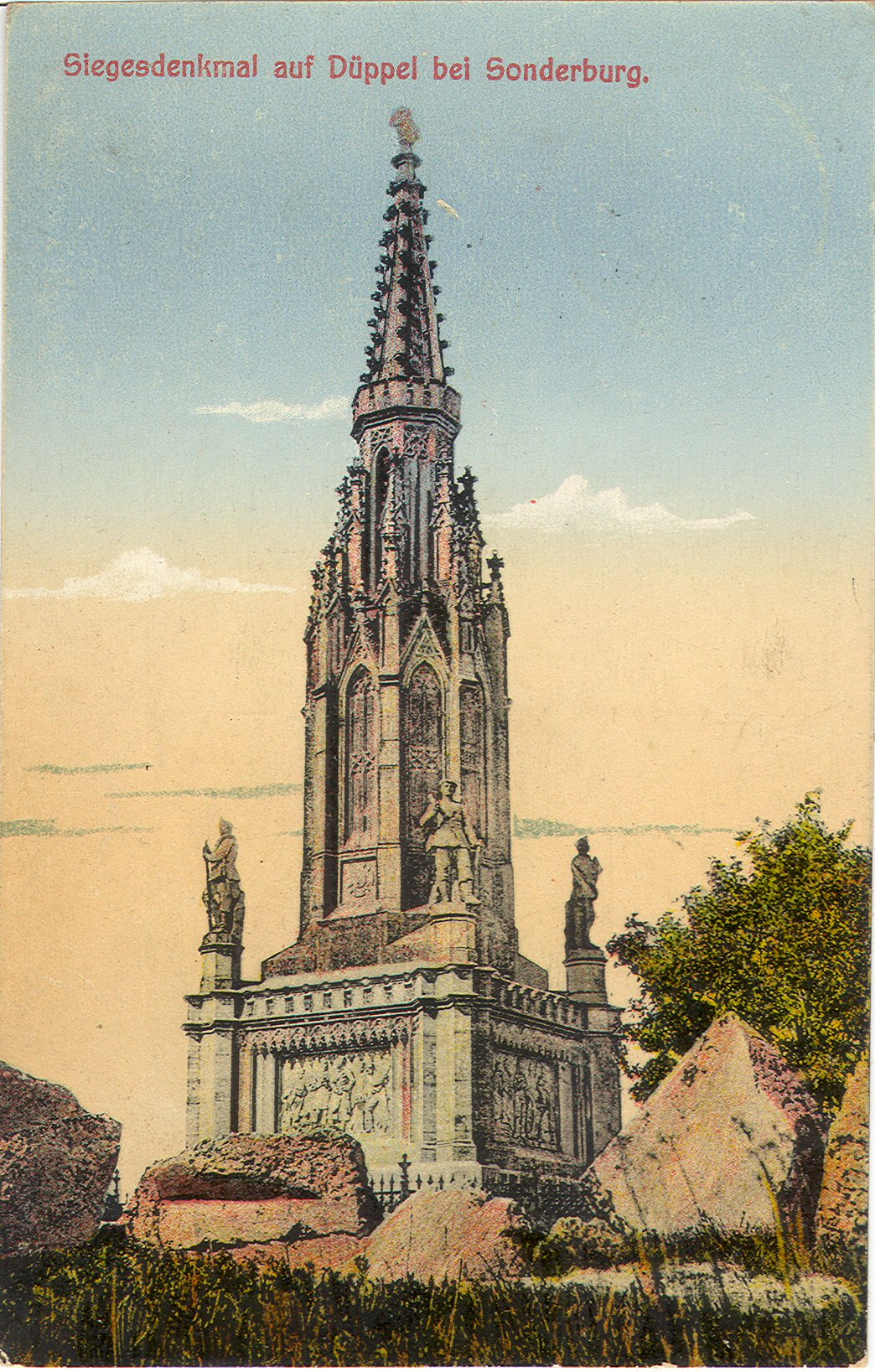 Das Siegesdenkmal 1864 („Düppel-Denkmal“) auf Schanze IV bei Sonderburg